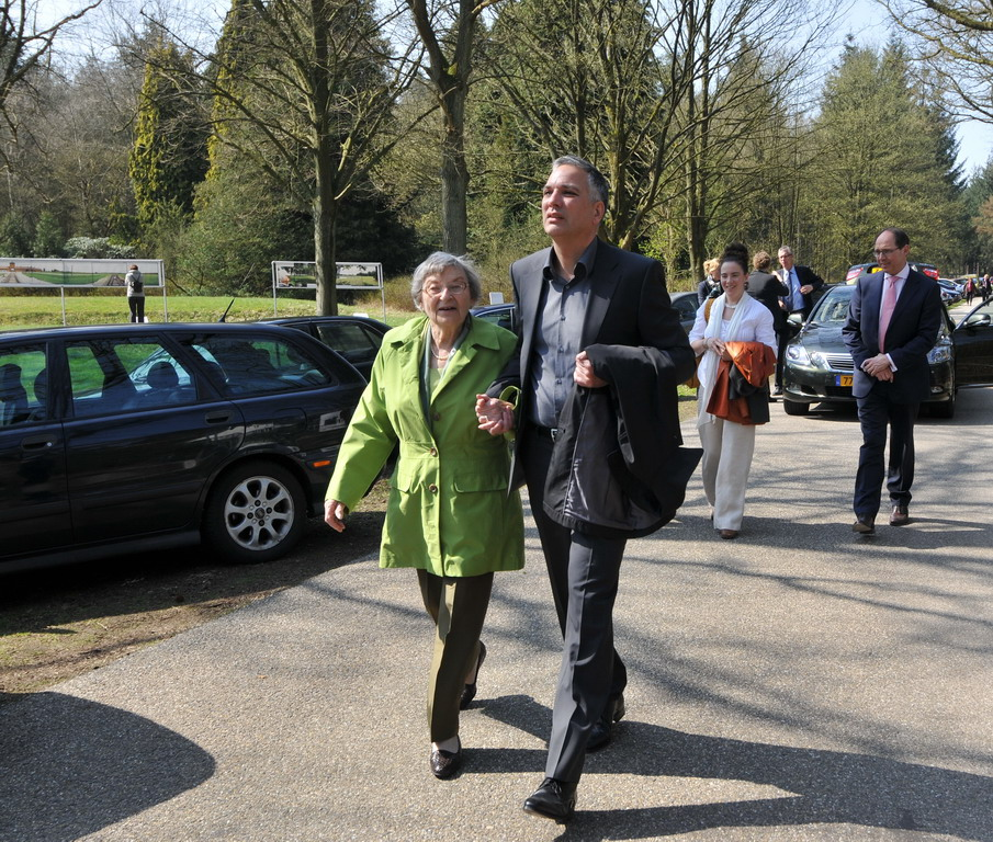 Selma Engel-Wijnberg (1922) was de laatste levende Nederlandse vrouw die het vernietigingskamp Sobibor in Polen heeft overleefd. In december 2018 is zij overleden. Mrs Selma Engel-Wijnberg was the last living Dutch woman who survived the Sobibor concentration camp. Today 65 years ago Canadian Forces liberated Camp Westerbork (in the north of The Netherlands). She died in December 2018.